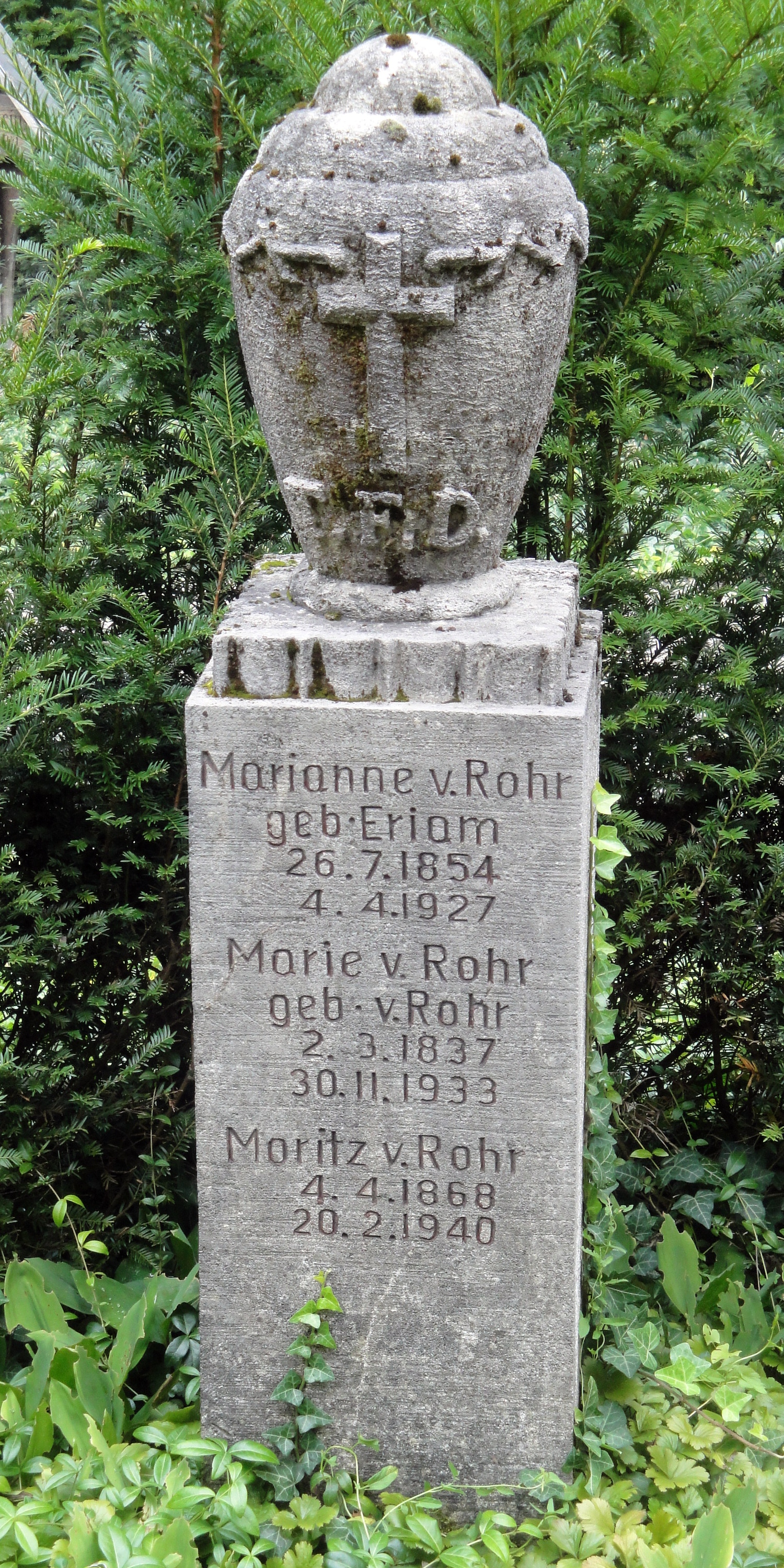 Grab von Moritz von Rohr auf dem Nordfriedhof in Jena